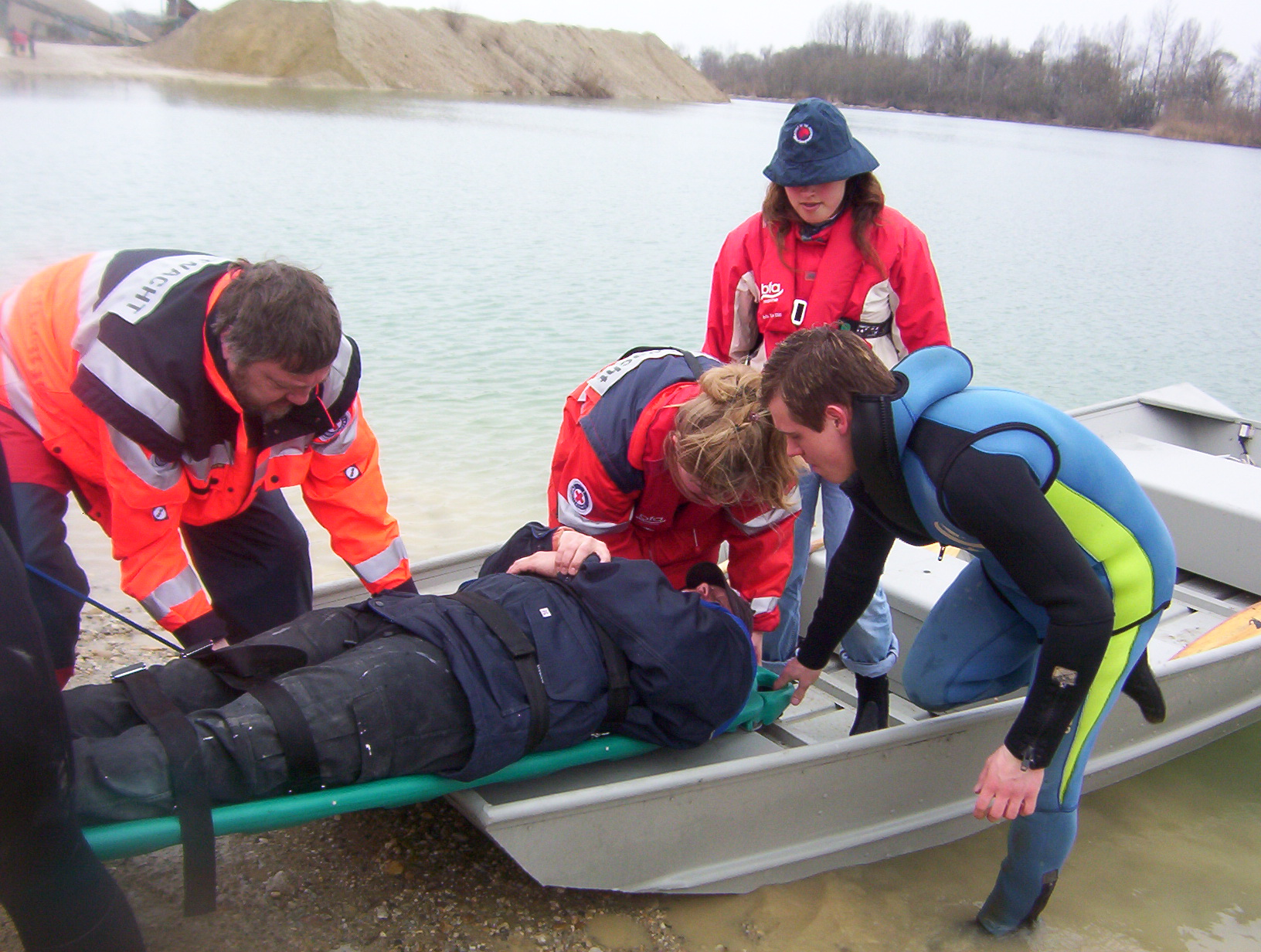 Wasserrettungsübung, Wasserretterausbildung